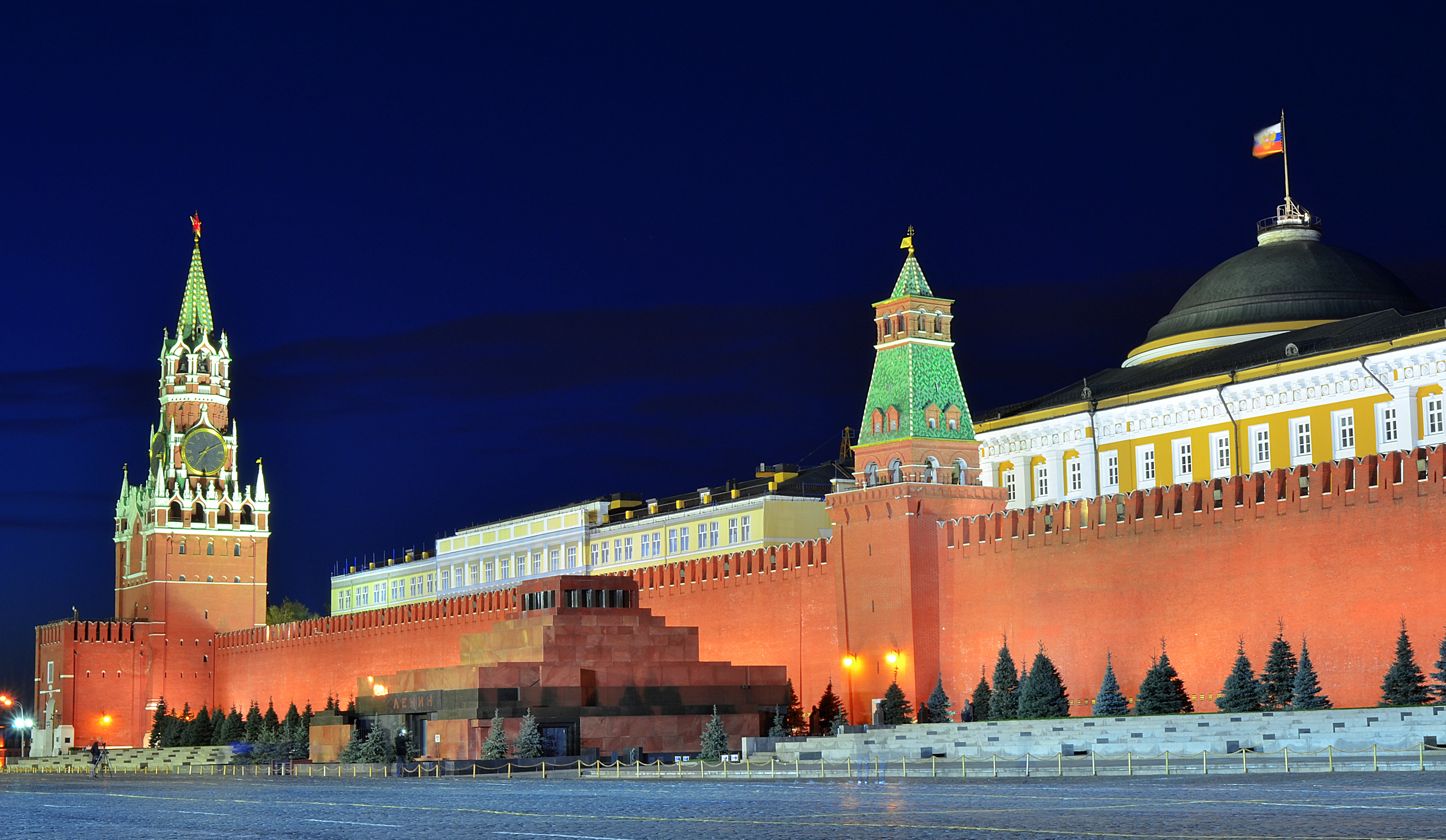 Можно увидеть здесь